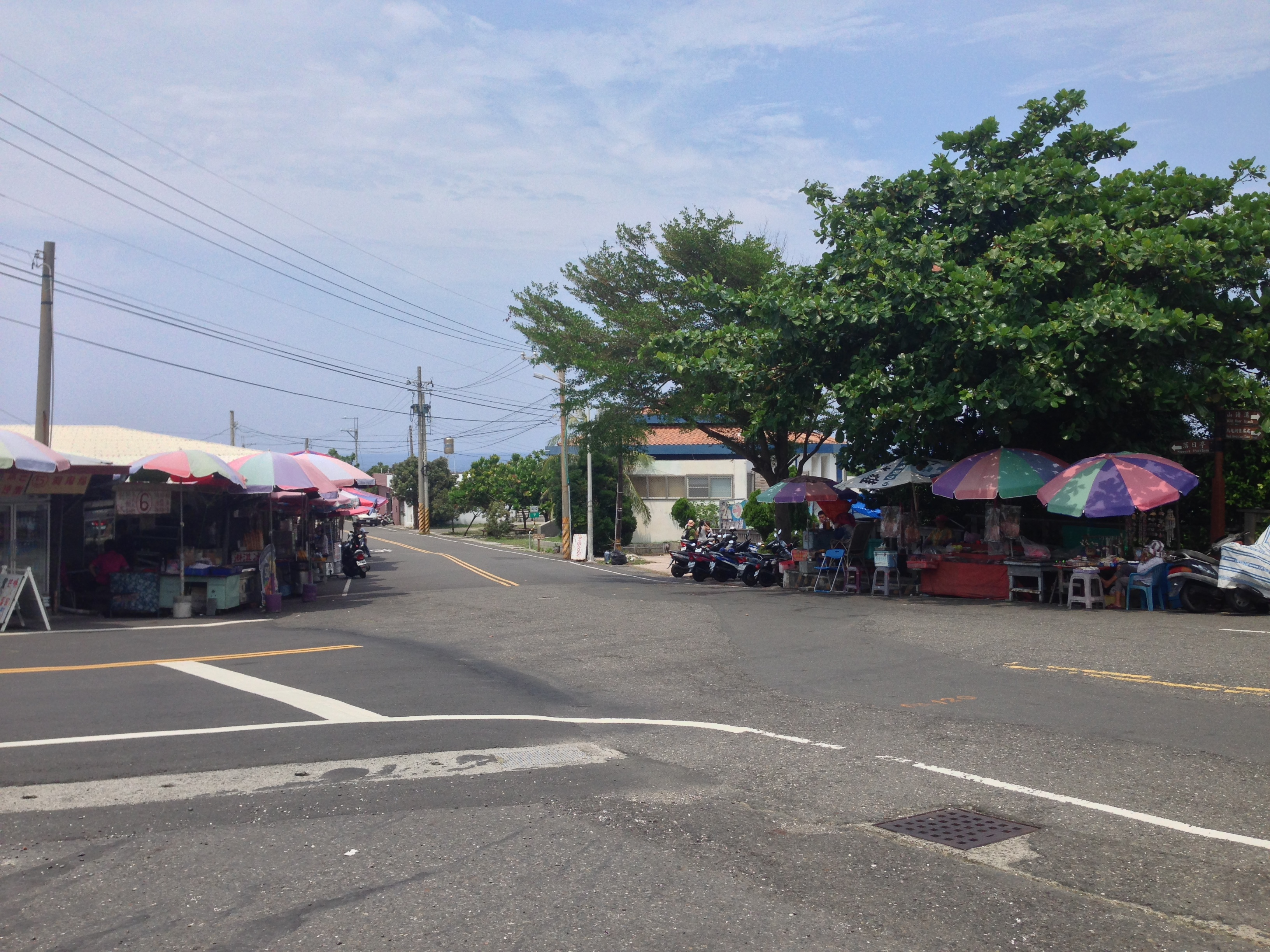 中文（台灣）: 屏206線與屏202線岔路